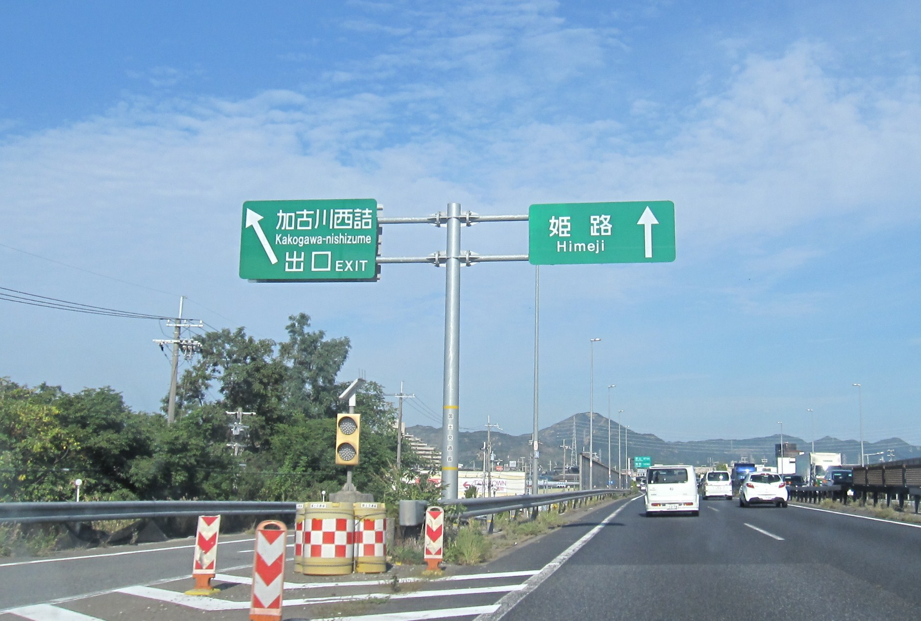 加古川西詰ランプ案内板